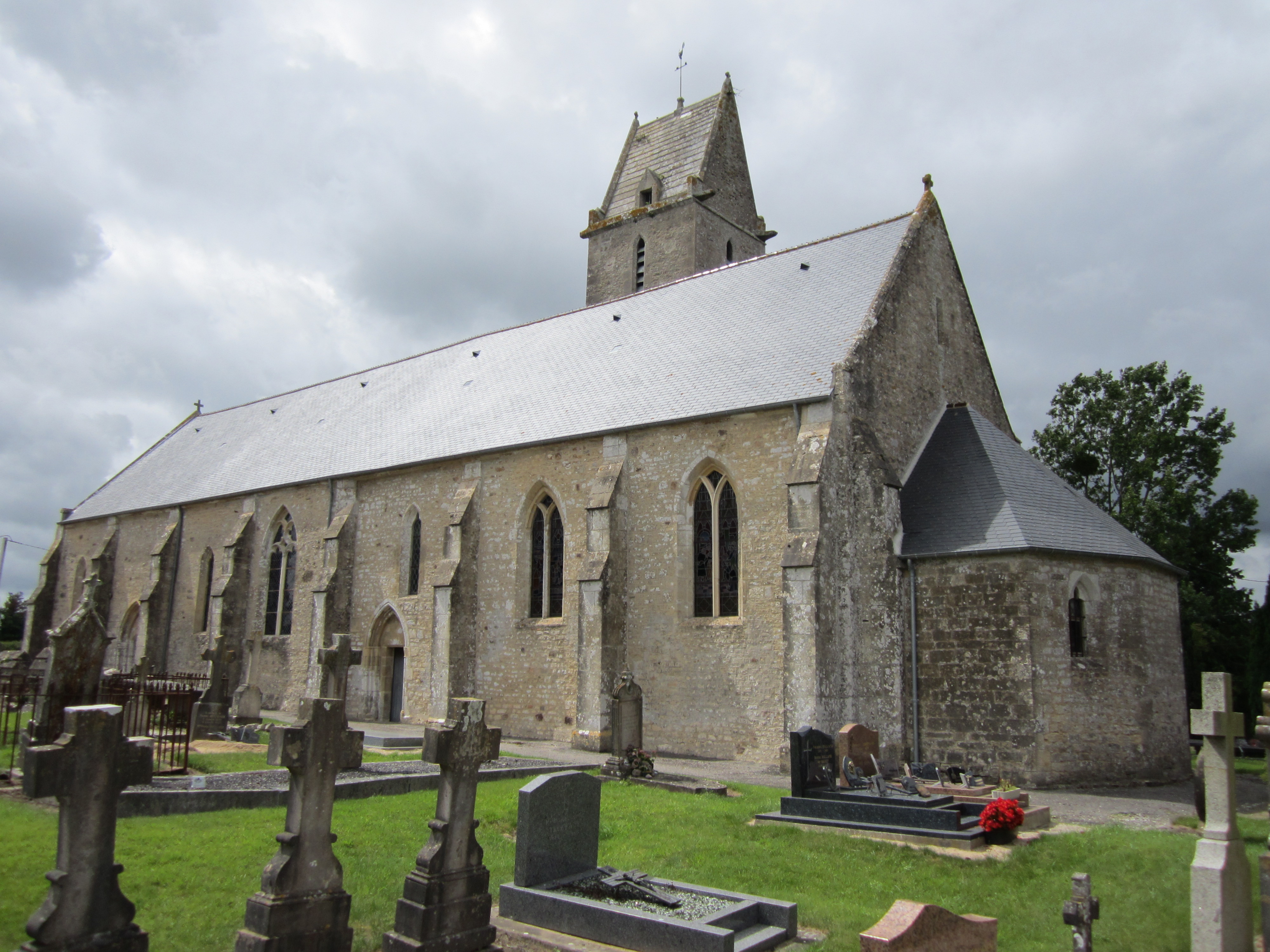 Église Saint-Éloi de Lieusaint (Manche)